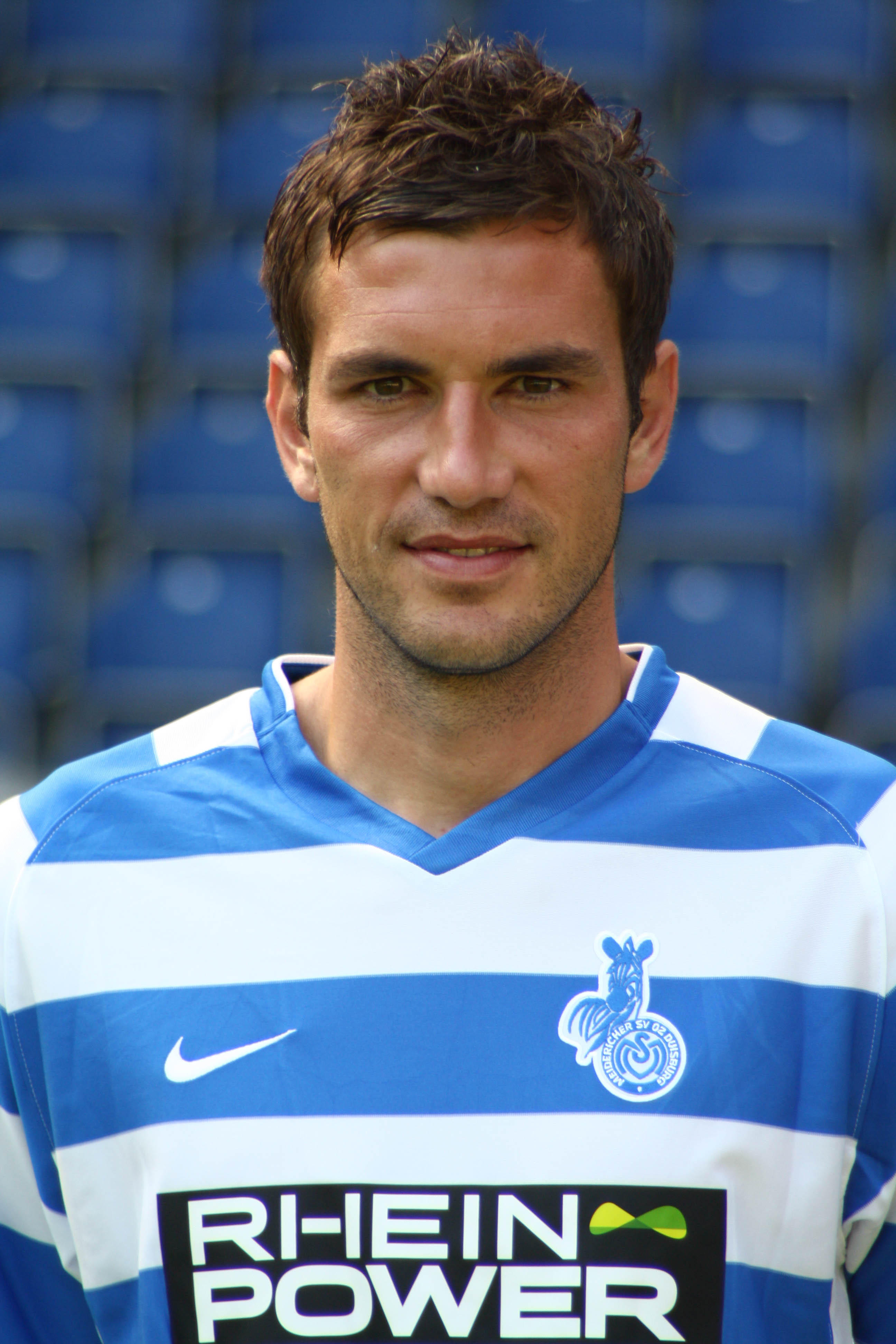 Goran Sukalo, MSV Duisburg